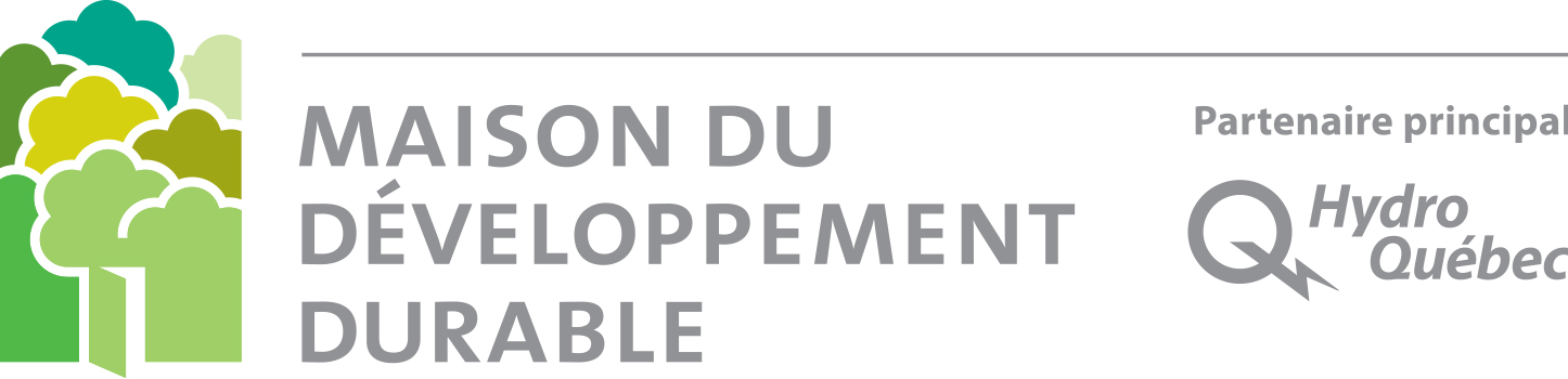 Logo de la MDD avec son partenaire principal